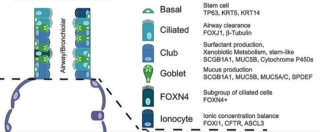 Figura 1_ ACE2 y TMPRSS2 se expresan en tipos celulares específicos en pulmones y HBEC. B) Células epiteliales bronquiales humanas (HBEC). Descripción general de los principales tipos de células en los pulmones y las vías respiratorias.